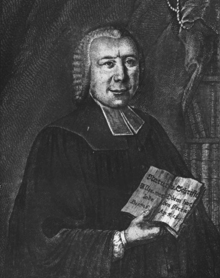 Hornjoserbsce: Portret Hadama Bohuchwała Šěracha – serbski farar, rozswětler a jako pčołar tež přirodospytnik mjezynarodneho formata.